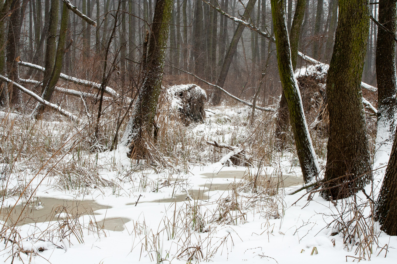 Zakole Wawerskie w Warszawie, las olchowy zimą, wykroty.